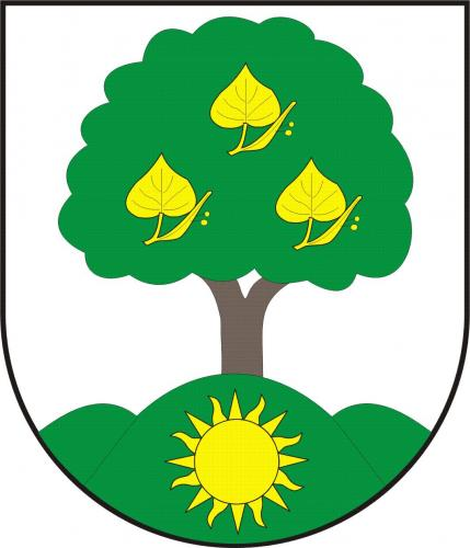 Lipinka znak